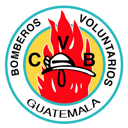 Logo del Cuerpo de Bomberos Voluntarios de Guatemala